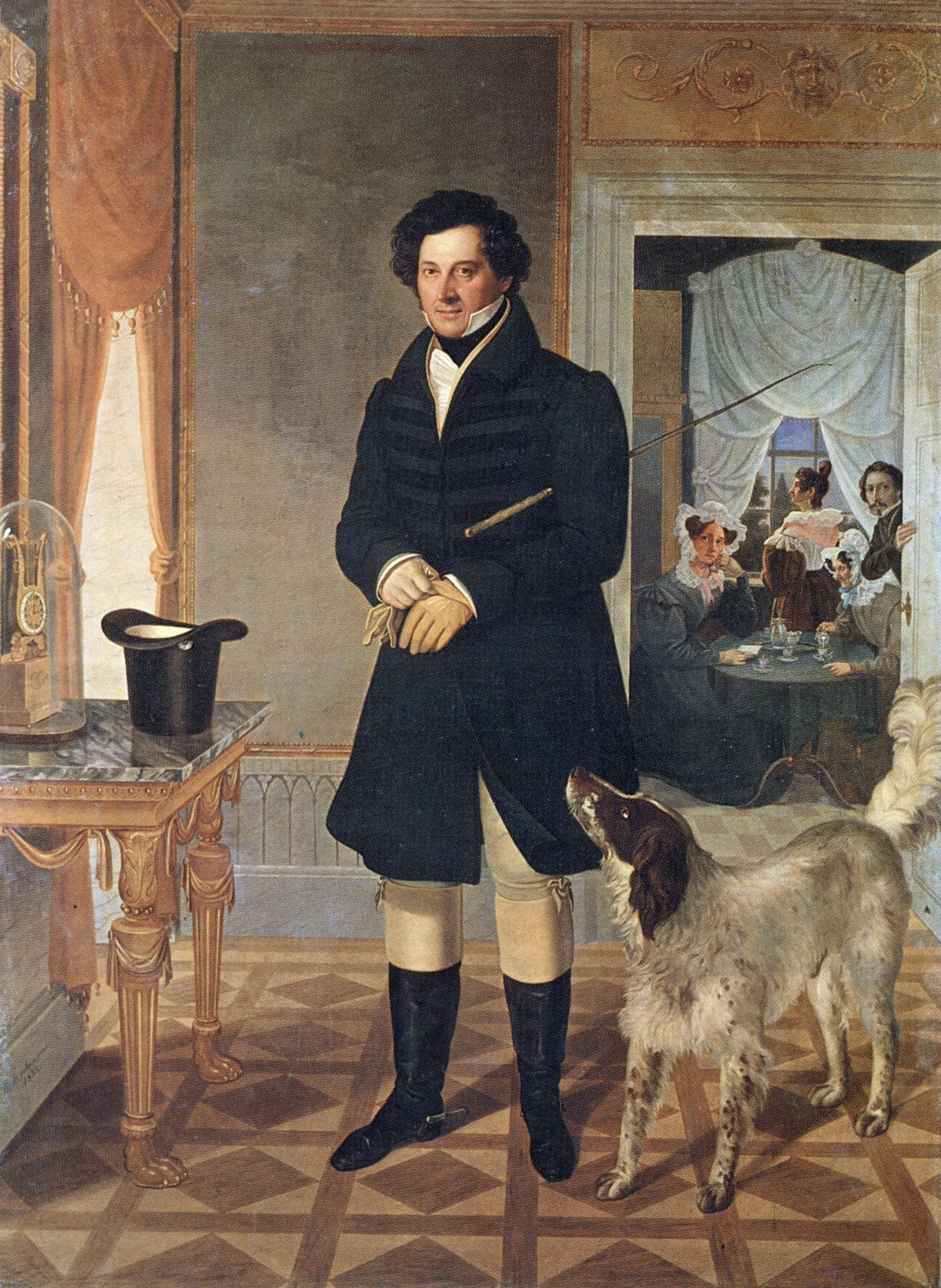 Carl Friedrich Franquet (* 2. Mai 1783; † 22. August 1851 in Braunschweig): Gemälde von W. Jordan von 1832. Öl auf Leinwand, 233 x 170 cm.